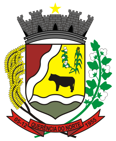 Brasão de Armas do município de Querência do Norte, Paraná, Brasil.